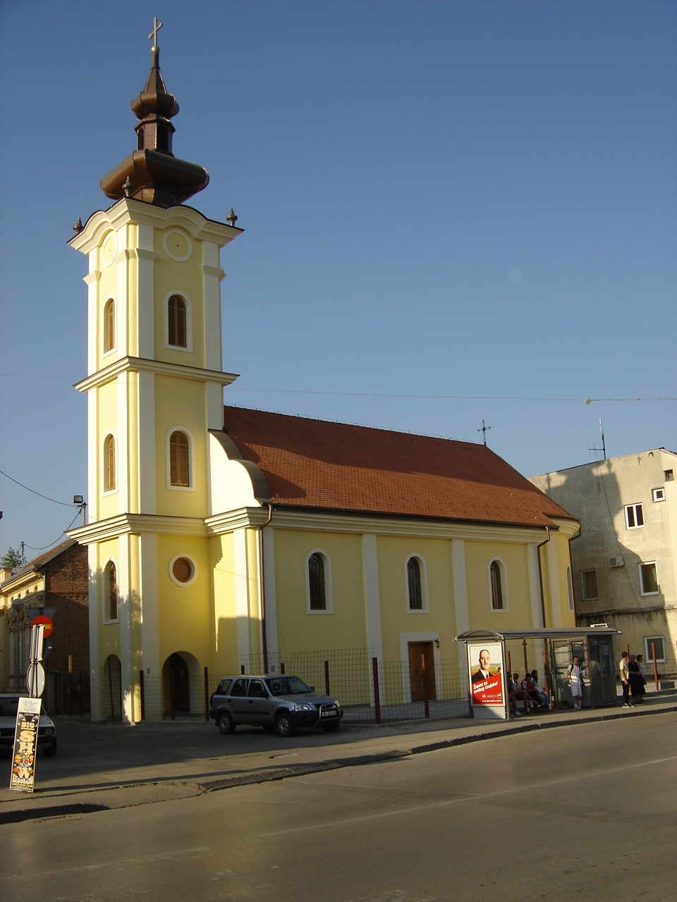 Hram silaska Duha svetoga, Vinkovci